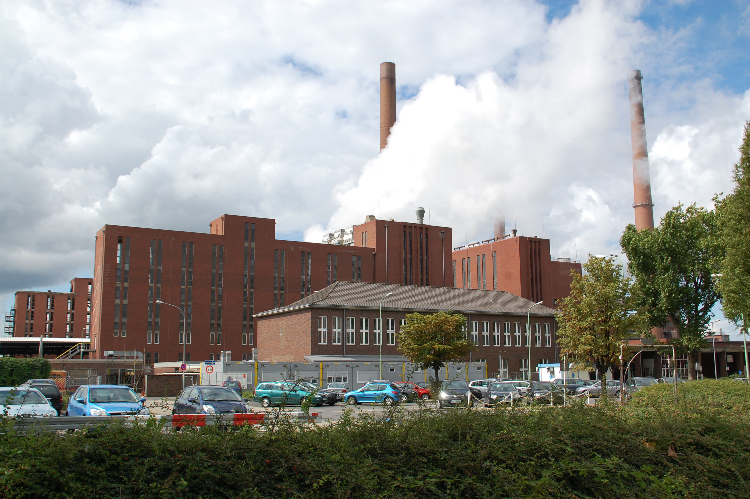 Kohleveredlungsbetrieb Fortuna-Nord in Niederaußem, Bergheim